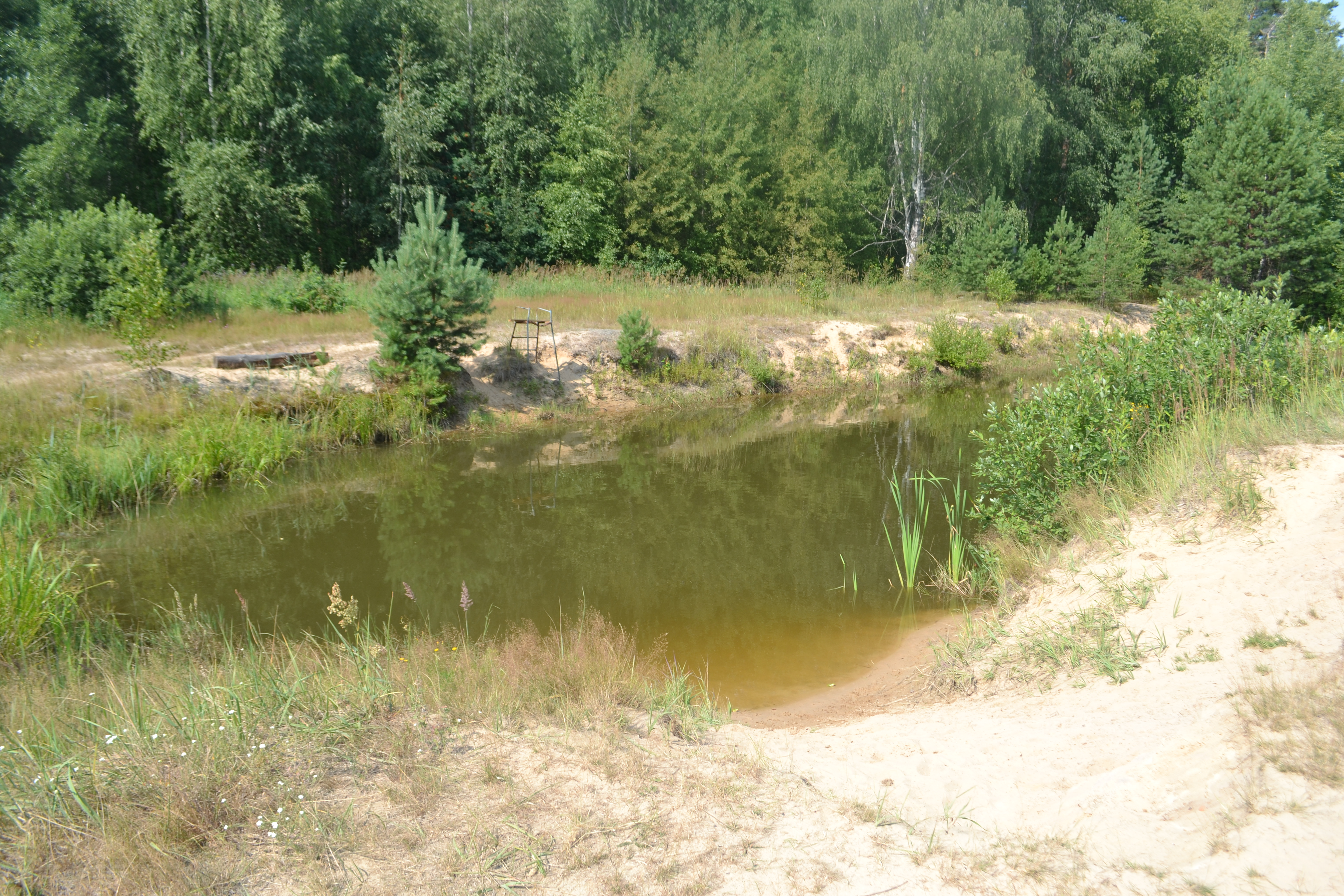 Пруд в деревне Пруды (Шатурский район)